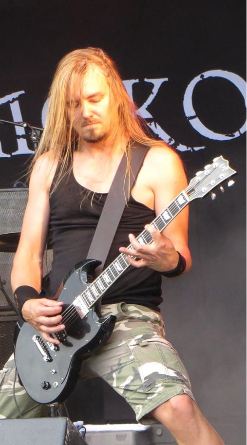 Tuomo Saikkonen, Qstock 2013